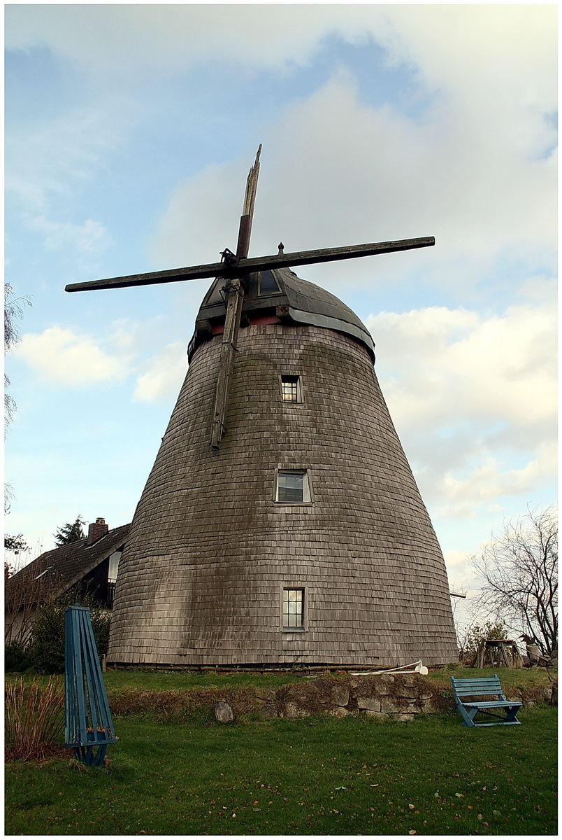 Alte Mühle in Sorsum